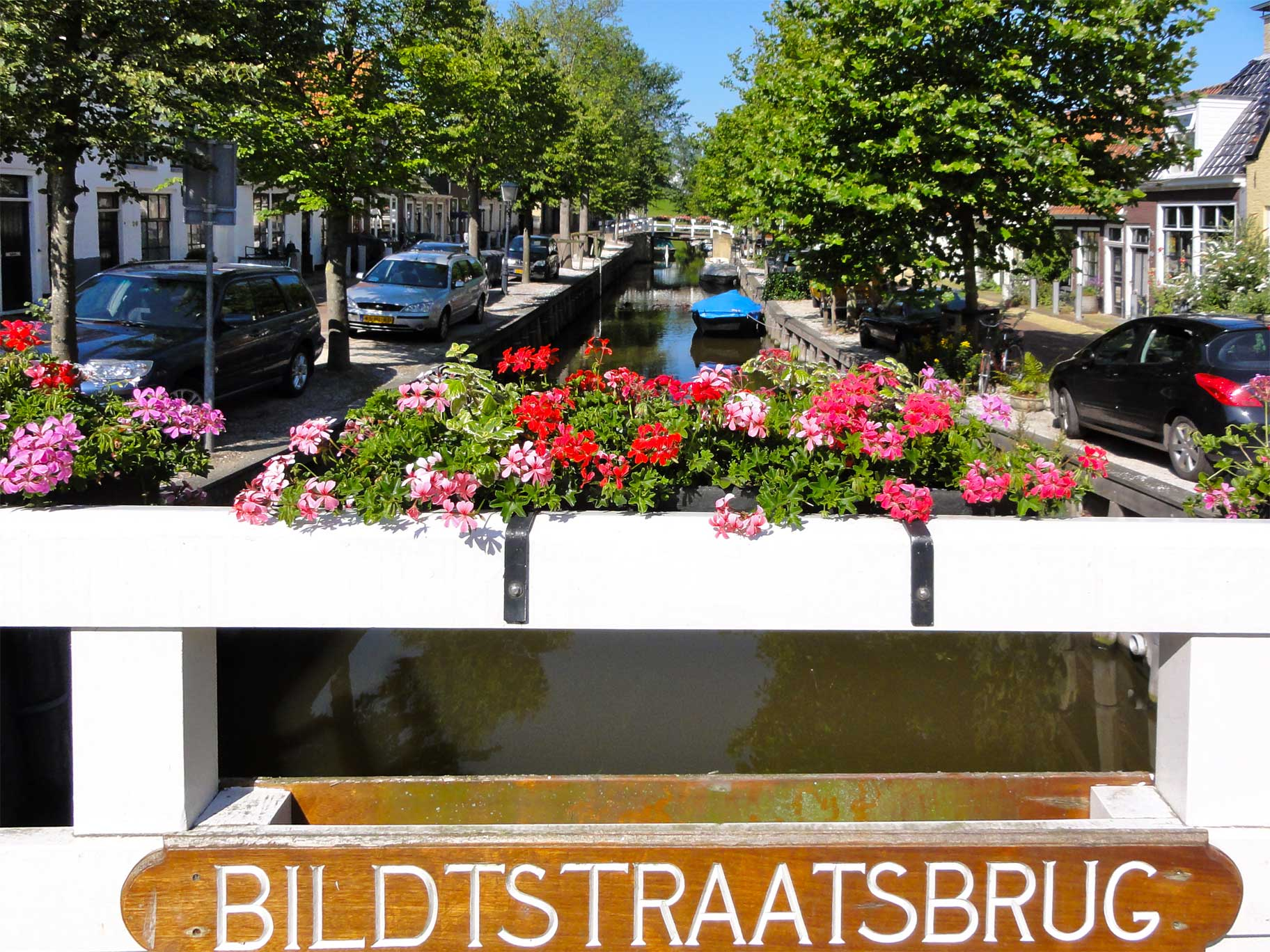 Bildtstraatsbrug aan de Zoutsloot in Harlingen